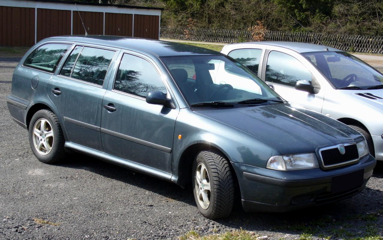 Skoda Octavia Combi